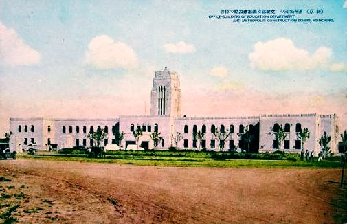 Special City Government office of Hsinking（新京特别市公署）